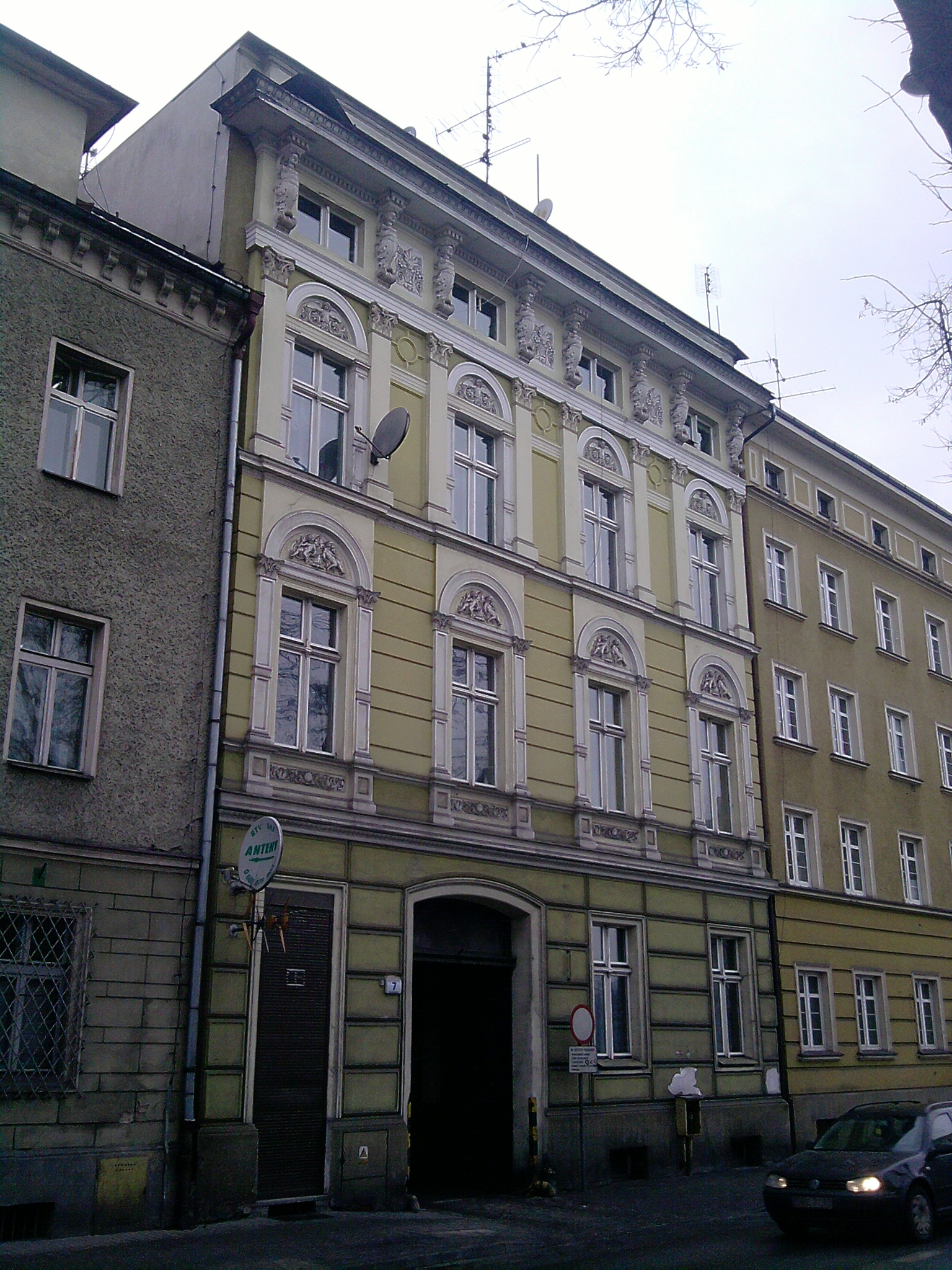 Kamienica przy placu Wolności 7